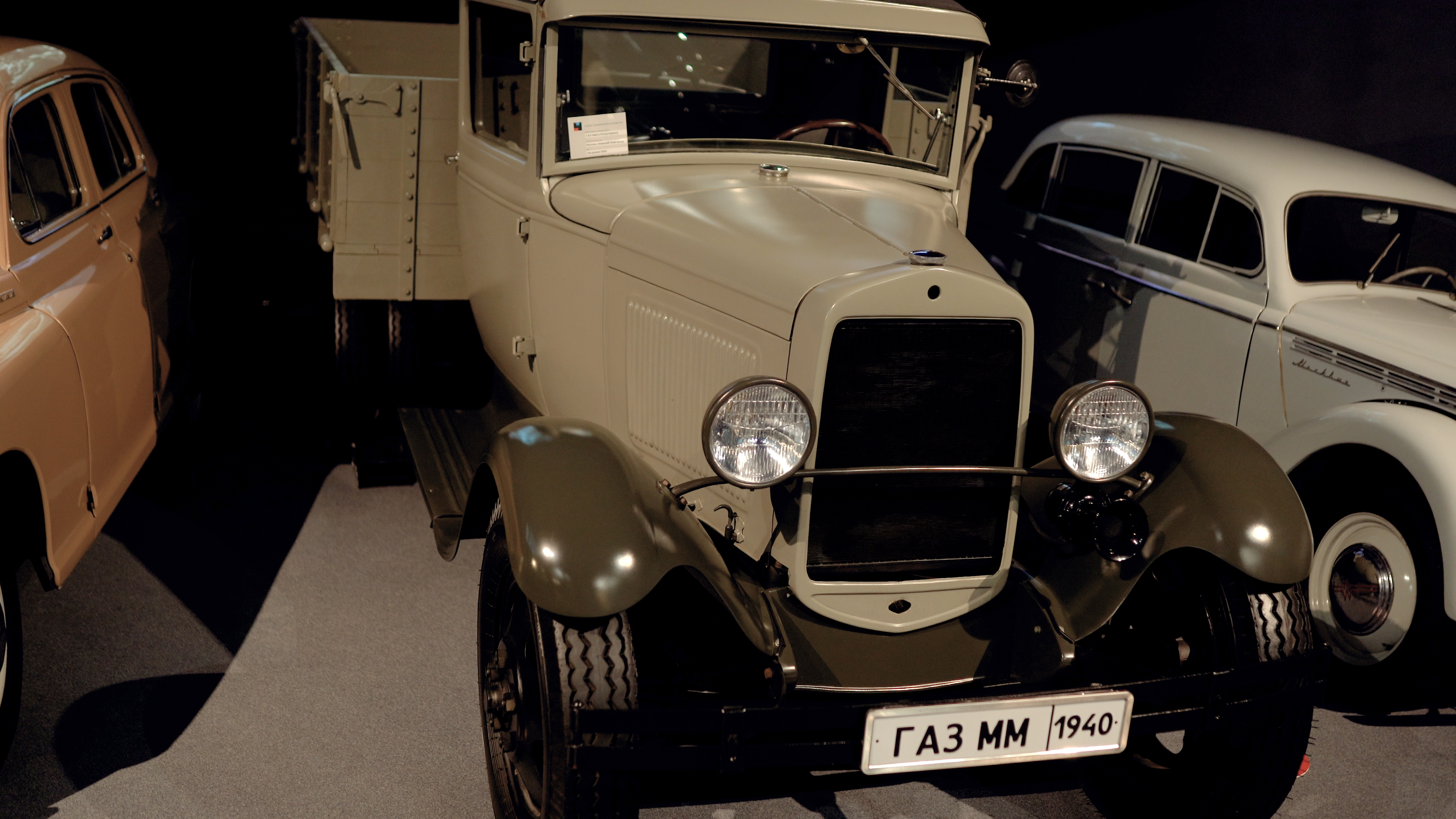 Газ-АА "Полуторка", который находится в автомобильной коллекции Музея Черномырдина. Этот автомобиль Виктор Черномырдин нашел в Орске, выкупил и забрал себе в коллекцию, впоследствии он попал в музей. На нем работал отец Виктора Черномырдина Степан Маркович.